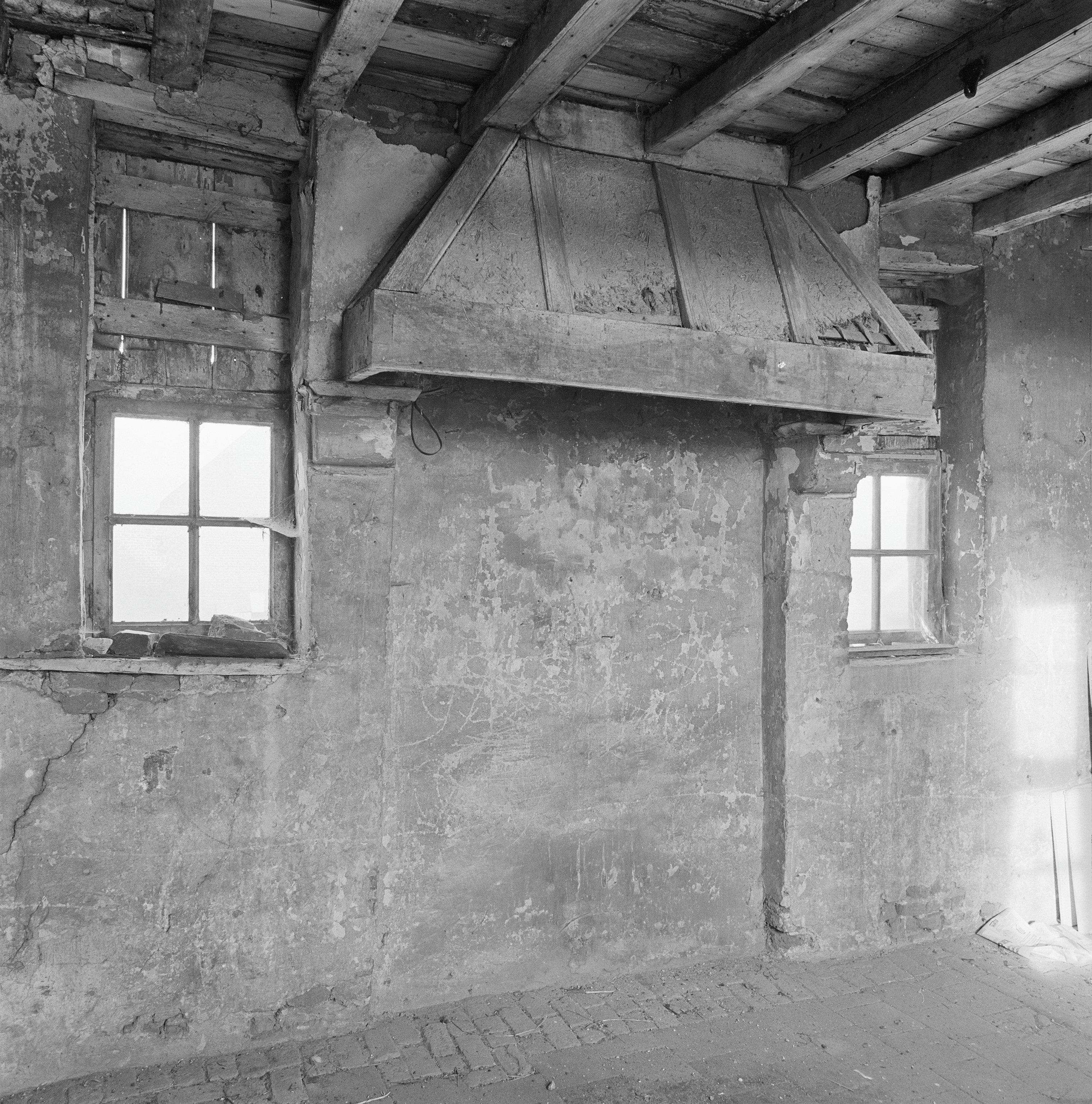 Kelmonderhof: kamer boven poort